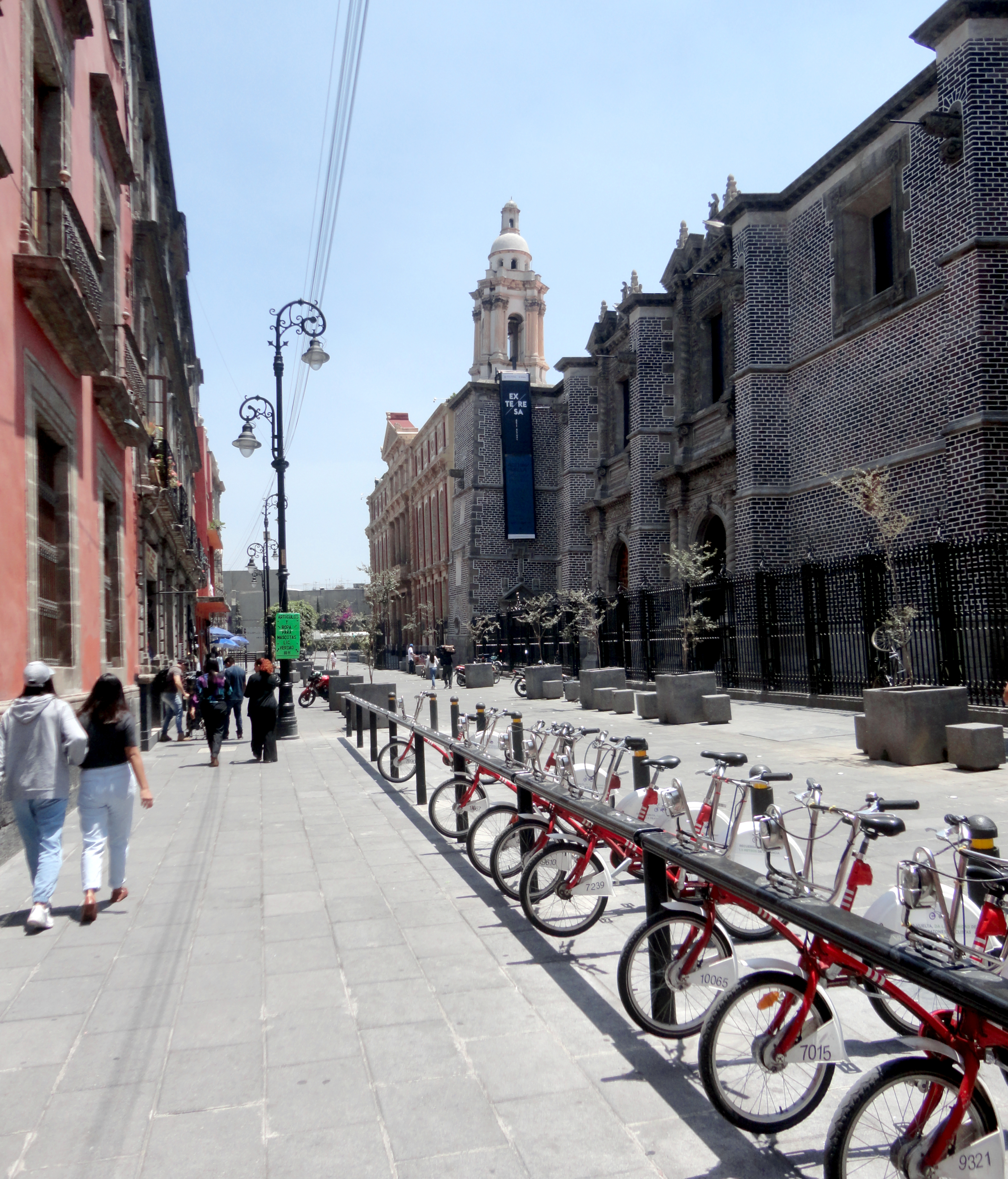 Iglesia de Santa Teresa la Antigua, Calle Licenciado Verdad, Ciudad de México.